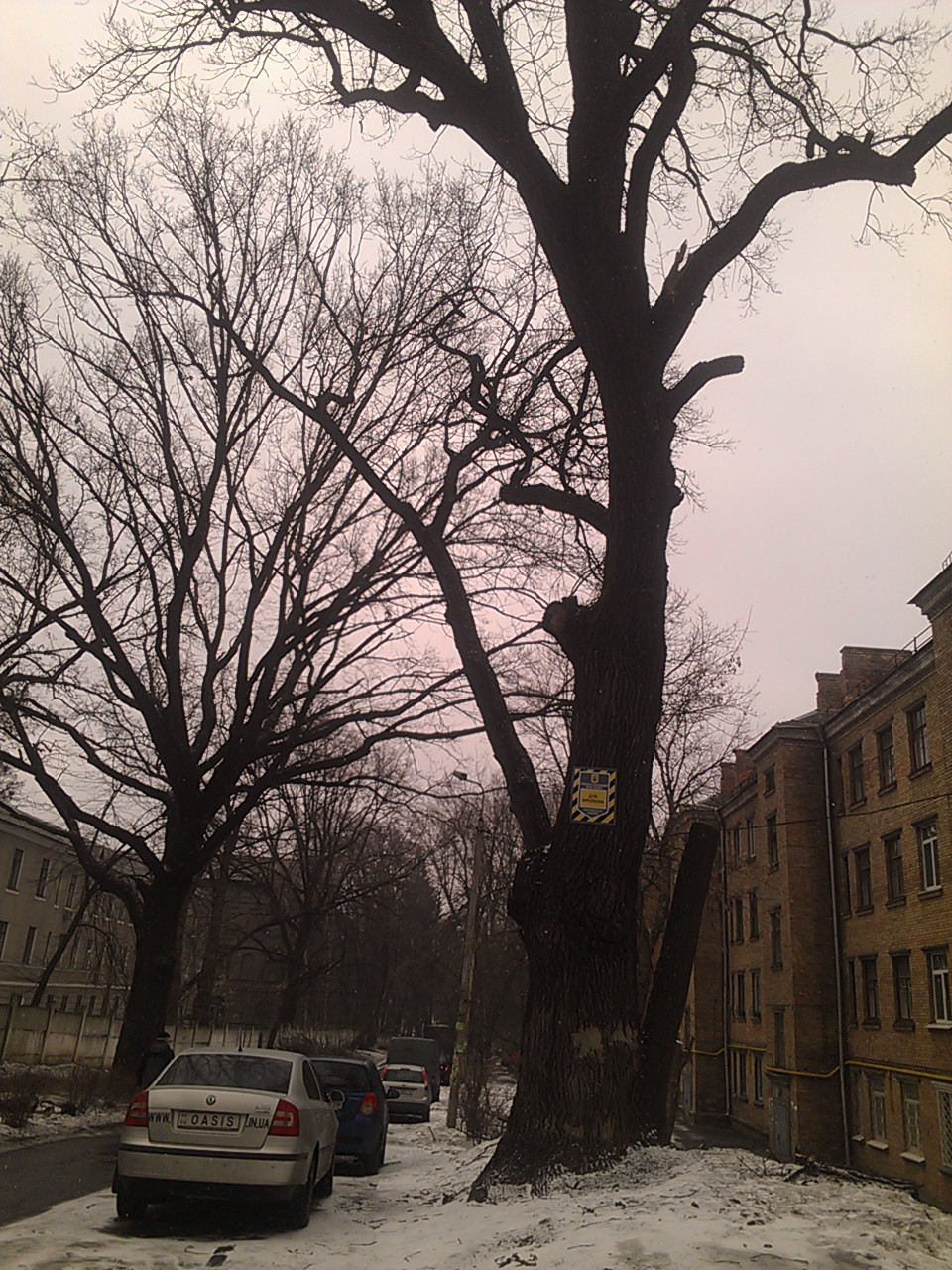 КВВАИУ, Киев, Украина. Реликтовый дуб академика Фролкина возле жилого корпуса 3 на территории училища.